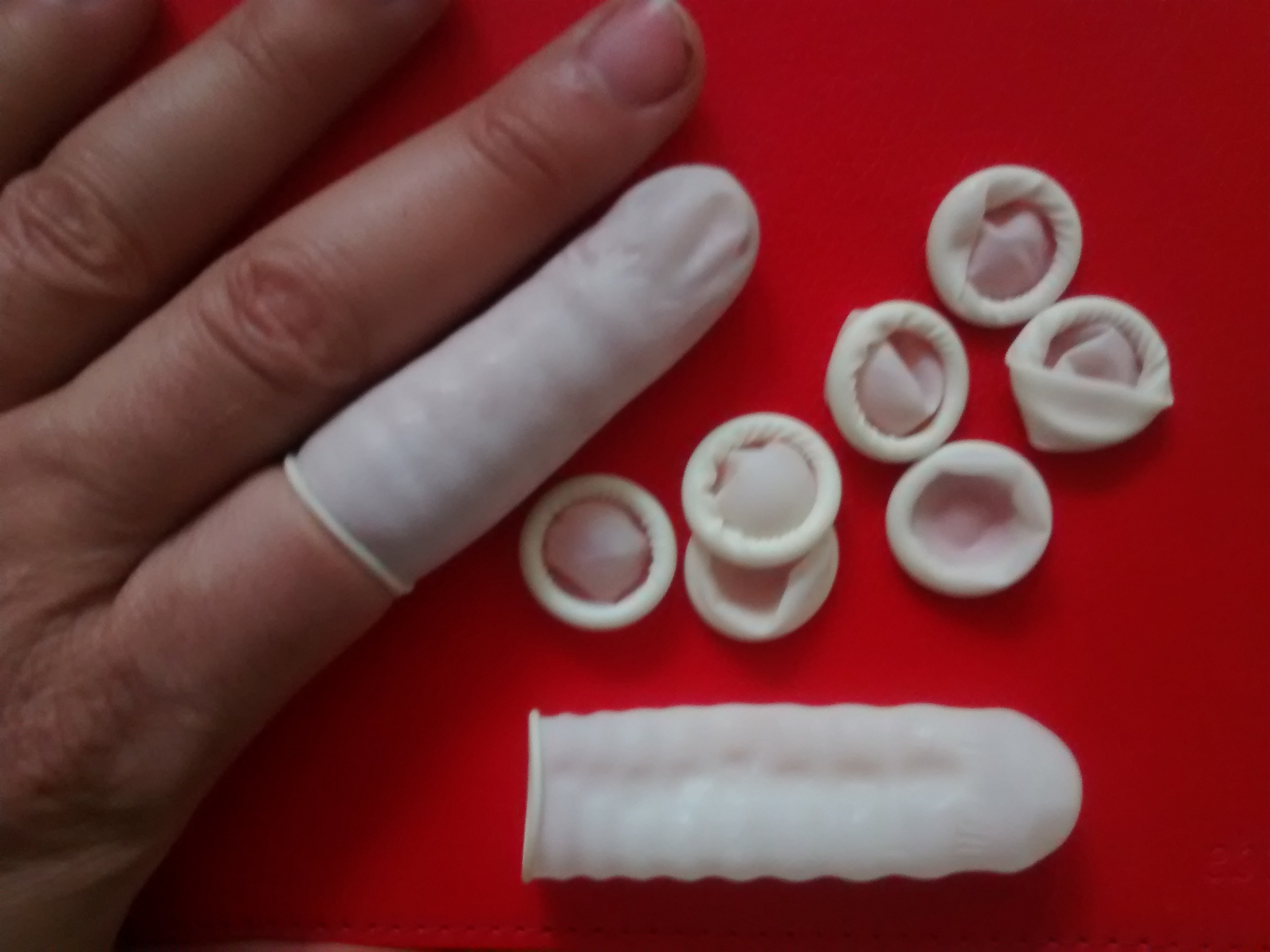 exemple de doigtiers